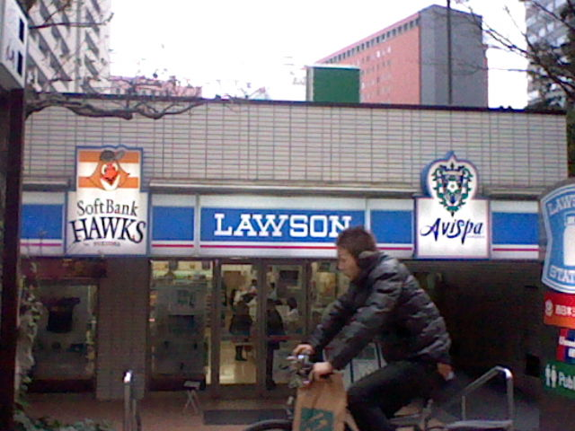 ローソン福岡市役所店の外観。